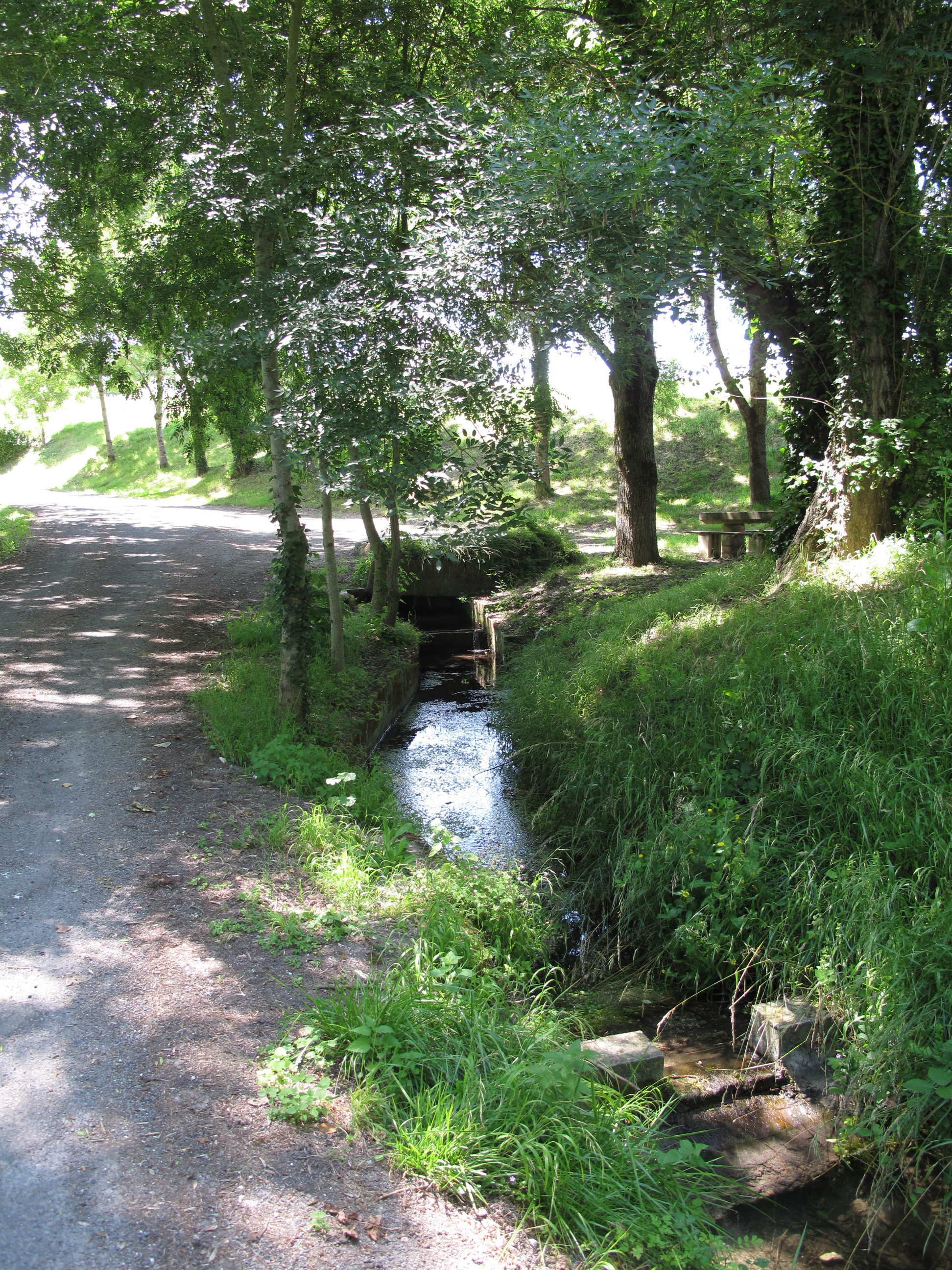 Le site de la Fontaine de Préguillac, avec son espace pique-nique